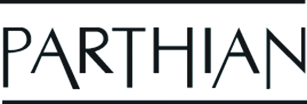 Le logo de Parthian